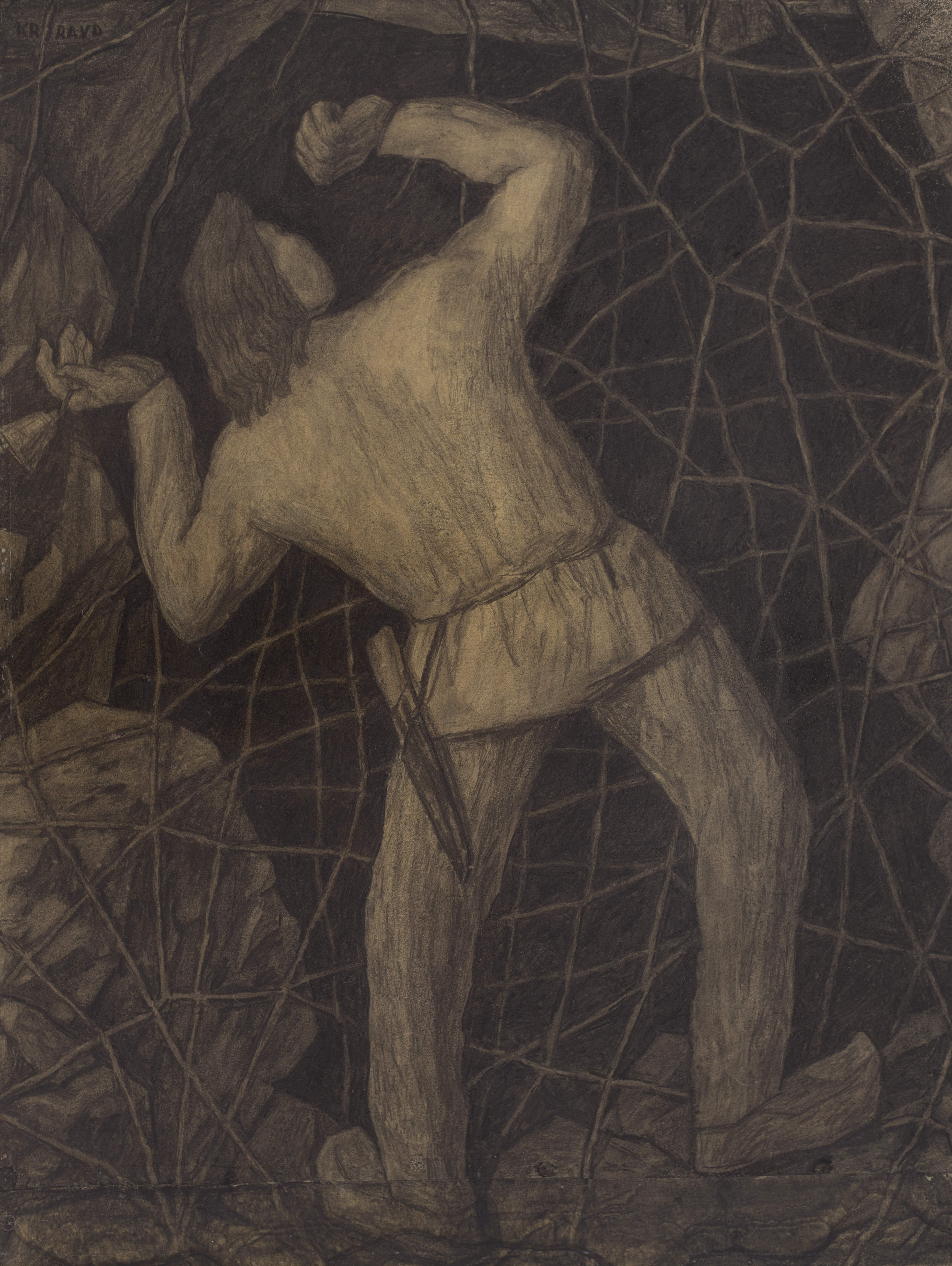 Kristjan Raua joonistus "Kalevipoeg põrgu teel võrke purustamas". Umbes 1935. Süsi paberil MUIS: TKM TR 4968 B 1700